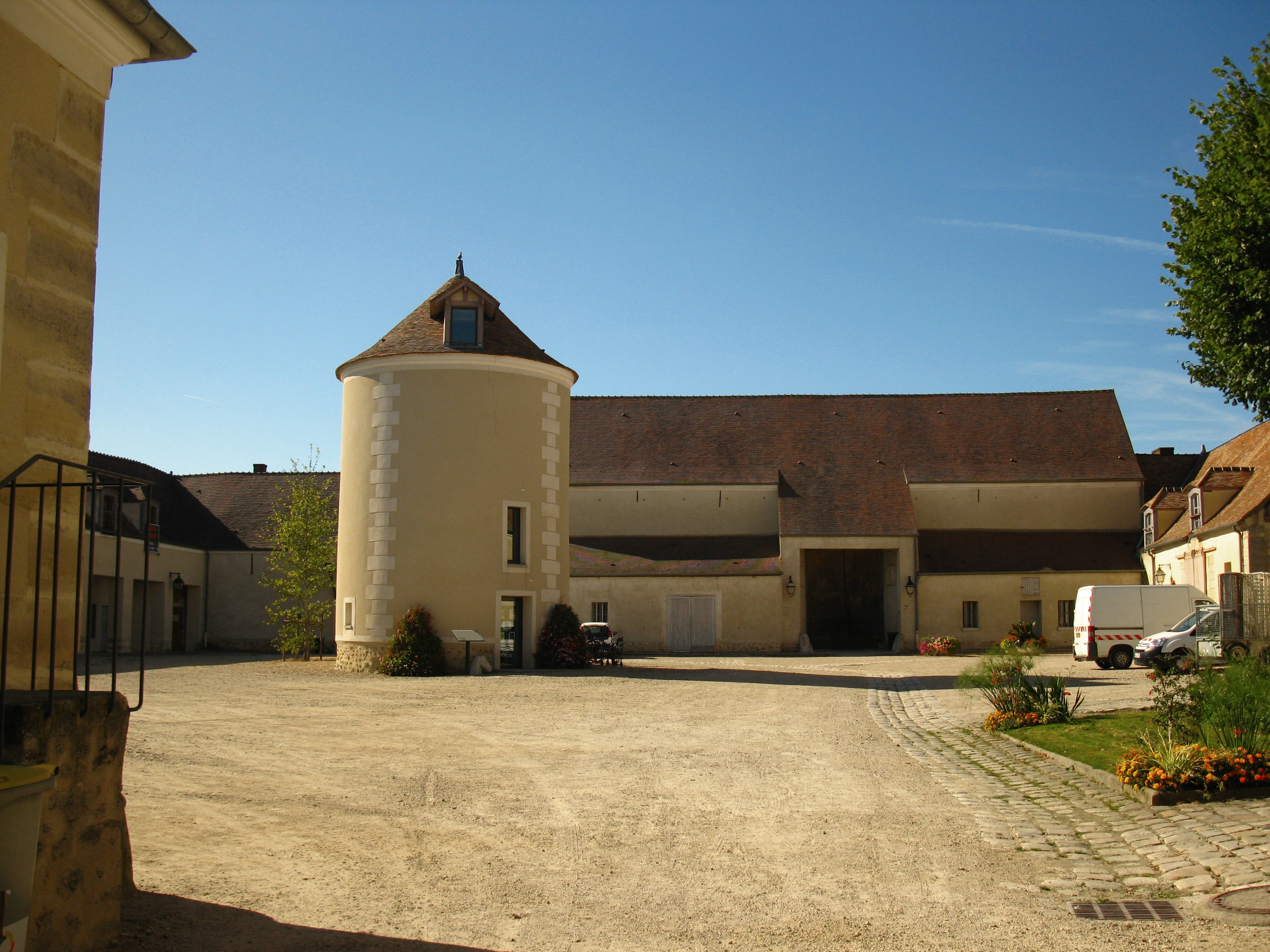 Ferme de Monsieur à Mandres-les-Roses (94) .